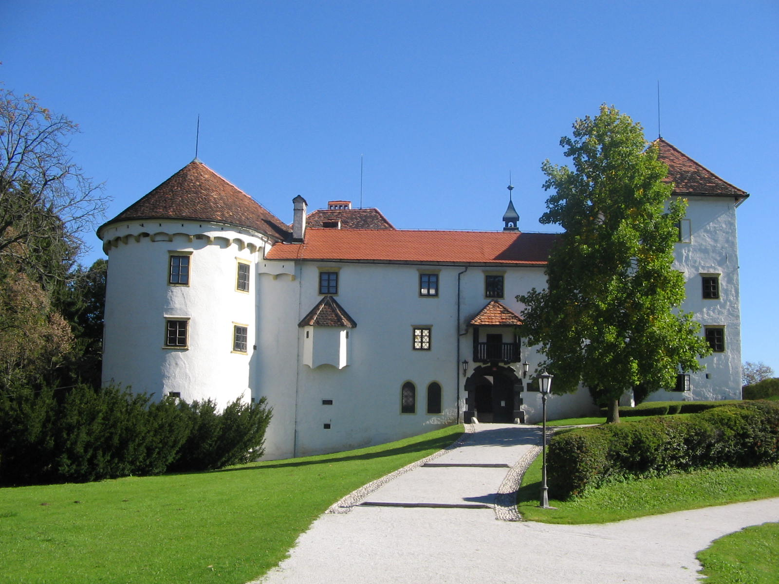 Bogenšperk, Burg in Nahe von Litija, Slovenija Quelle: eigene Aufnahme 01 Okt. 2005 Fotograf: Janez Novak, Ljubljana, Slovenija